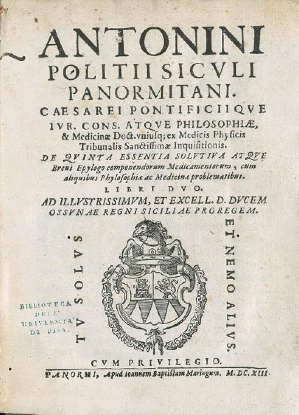 Riproduzione del frontespizio dell'opera del medico Antonino Polizzi